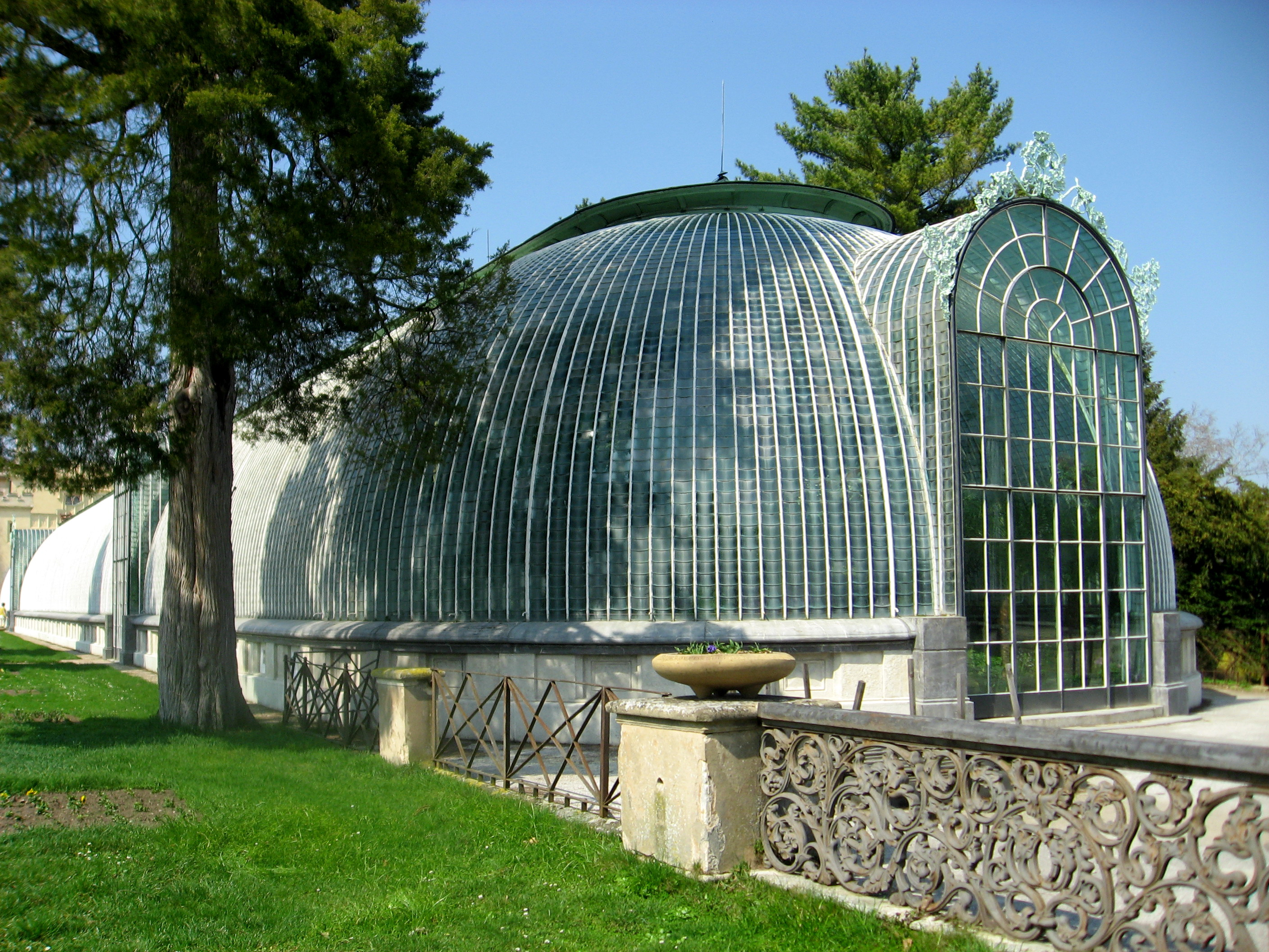 Skleník v Lednici